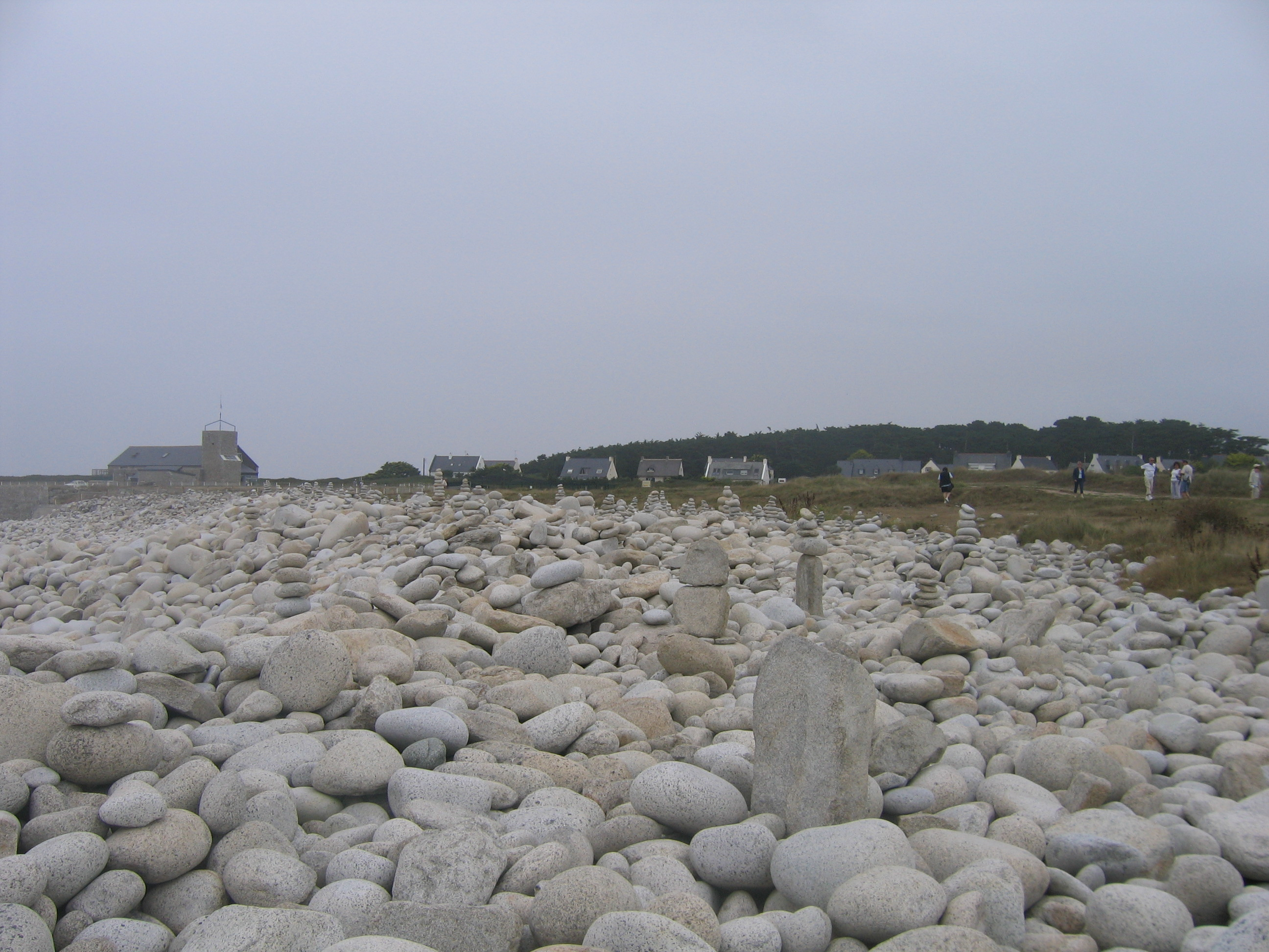 le centre LPO de l' Île-Grande quartier de Pleumeur-Bodou dans les Côtes-d'Armor Bretagne